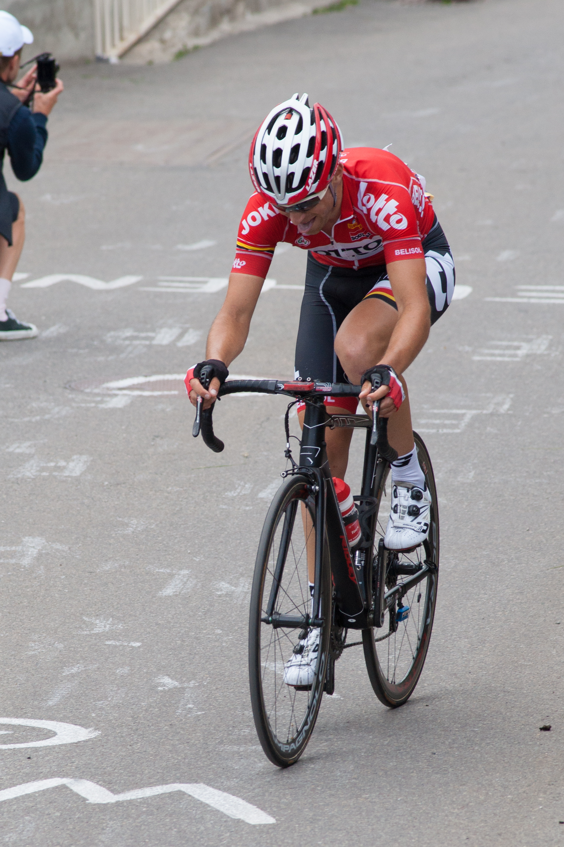 Critérium du Dauphiné 2014 - Etape 7 - Tony Gallopin à Finhaut